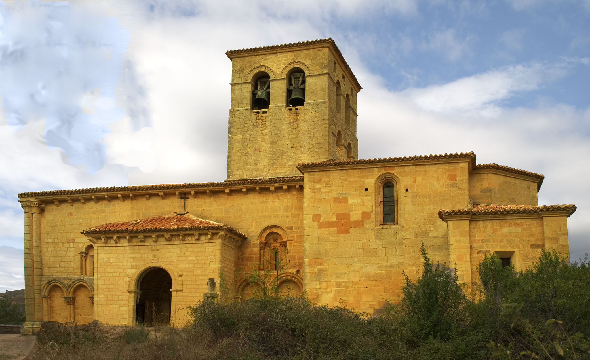 Iglesia de San Esteban, Moradillo de Sedano, Burgos (España). Románico, Gótico sXII